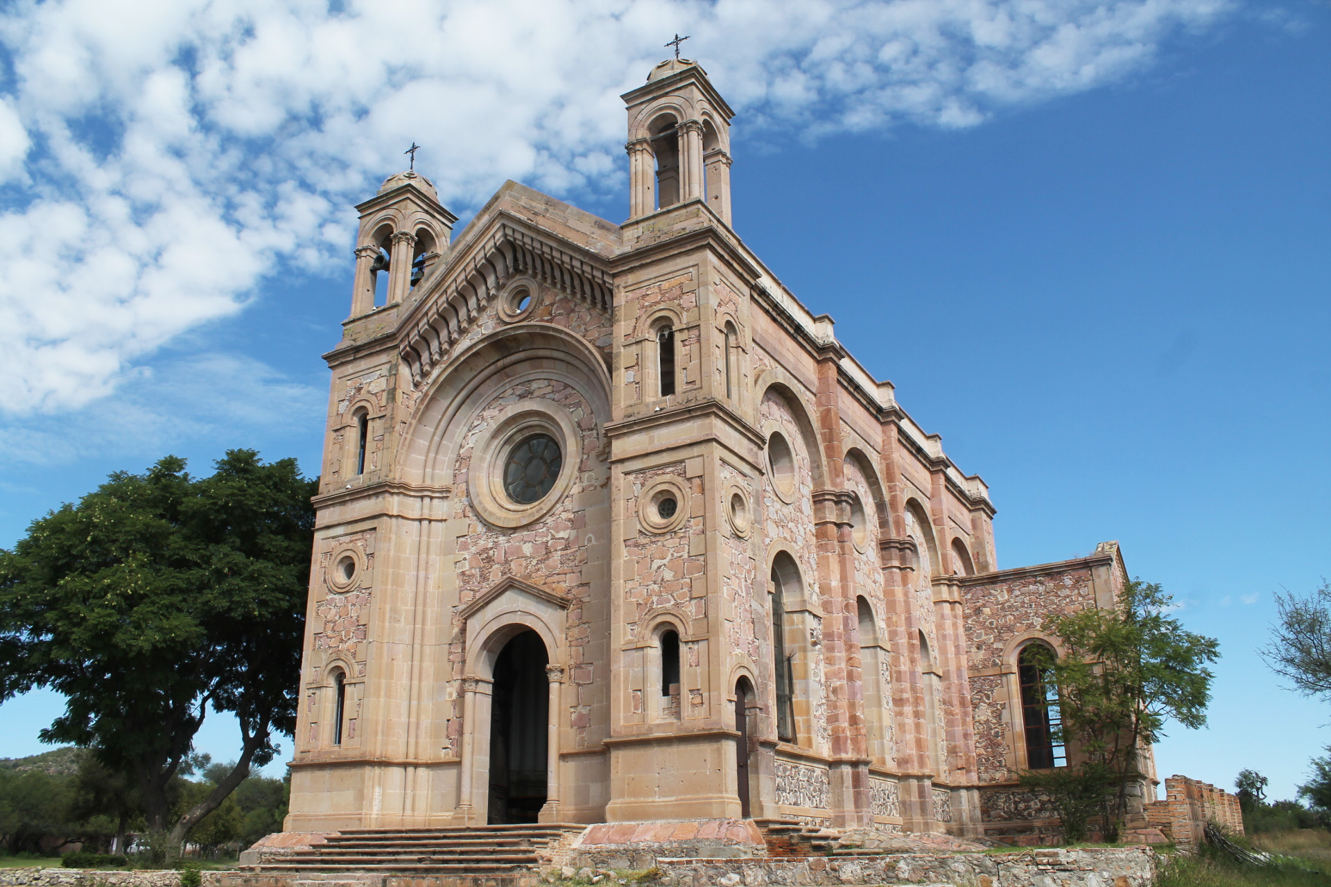 Templo San Isidro Labrador. Ex Hacienda Garabato, Pabellón de Arteaga, Ags.